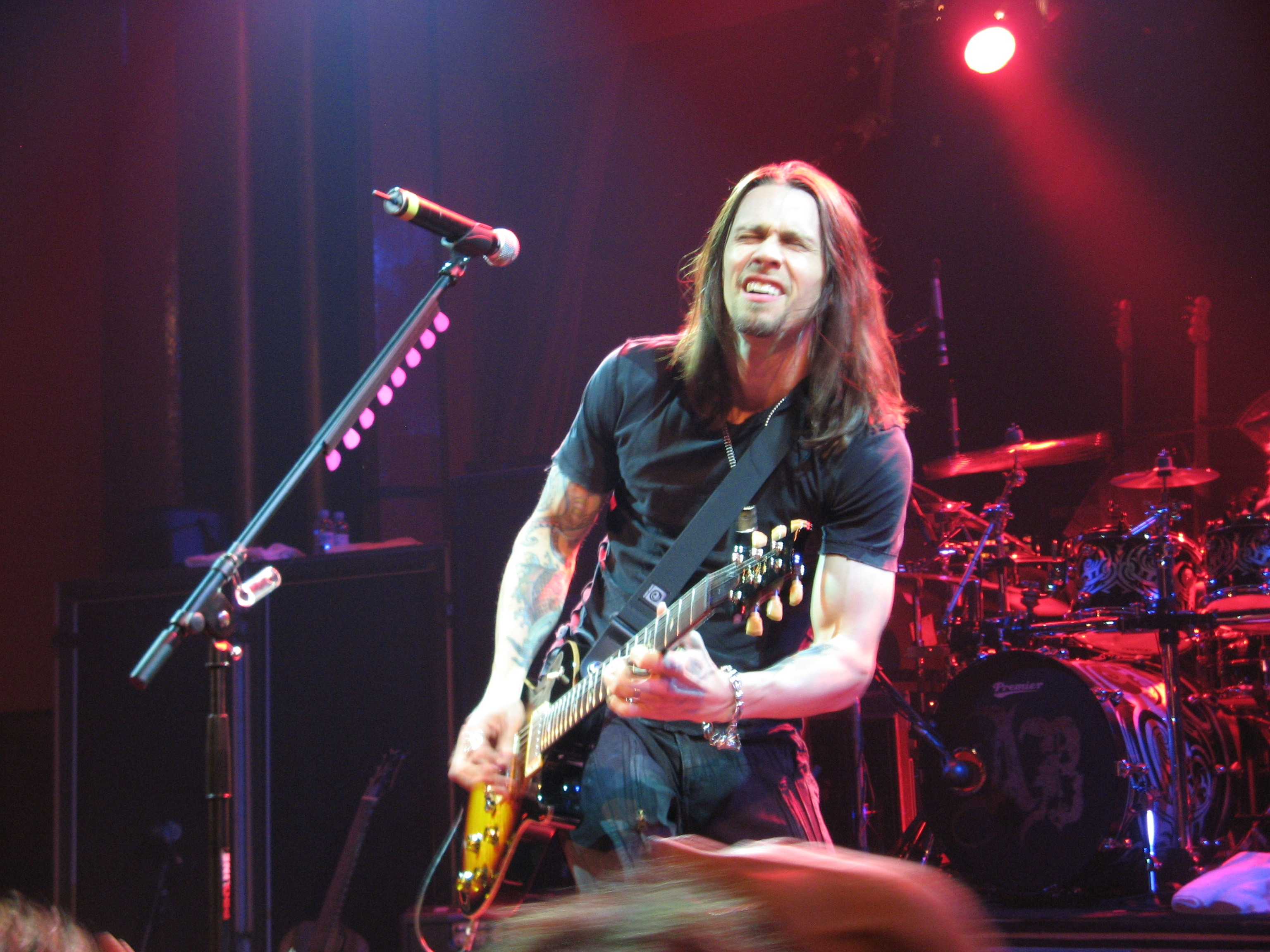 Myles Kennedy from Alter Bridge